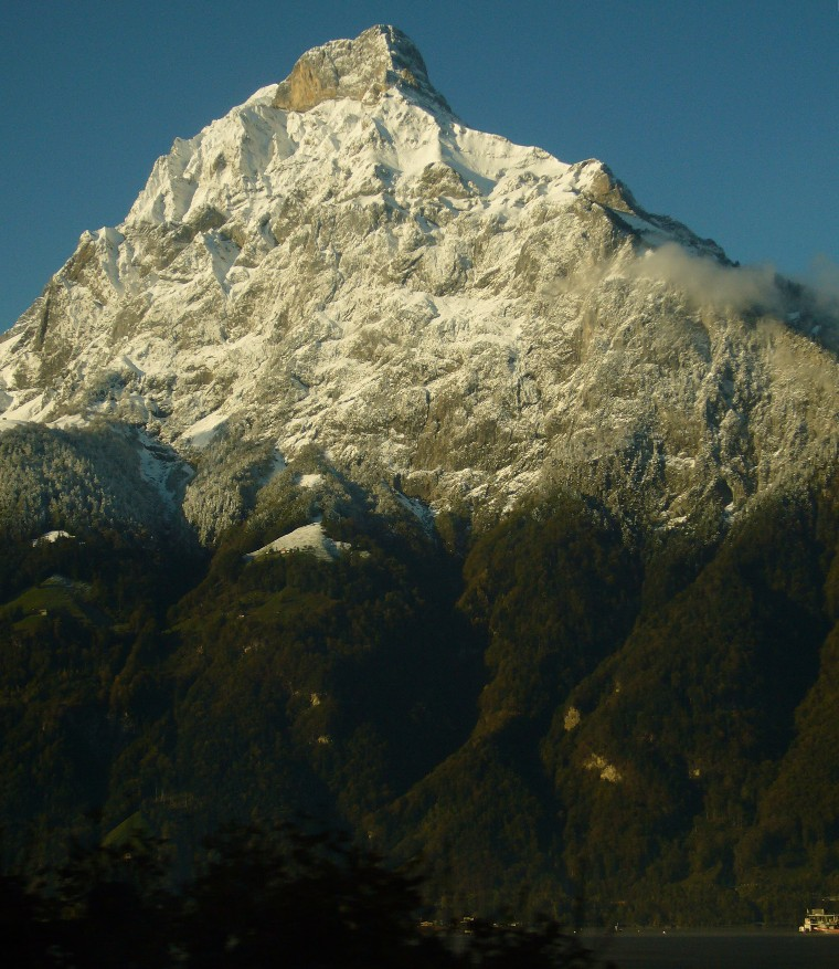 Gitschen von Nordosten über den Vierwaldstättersee gesehen